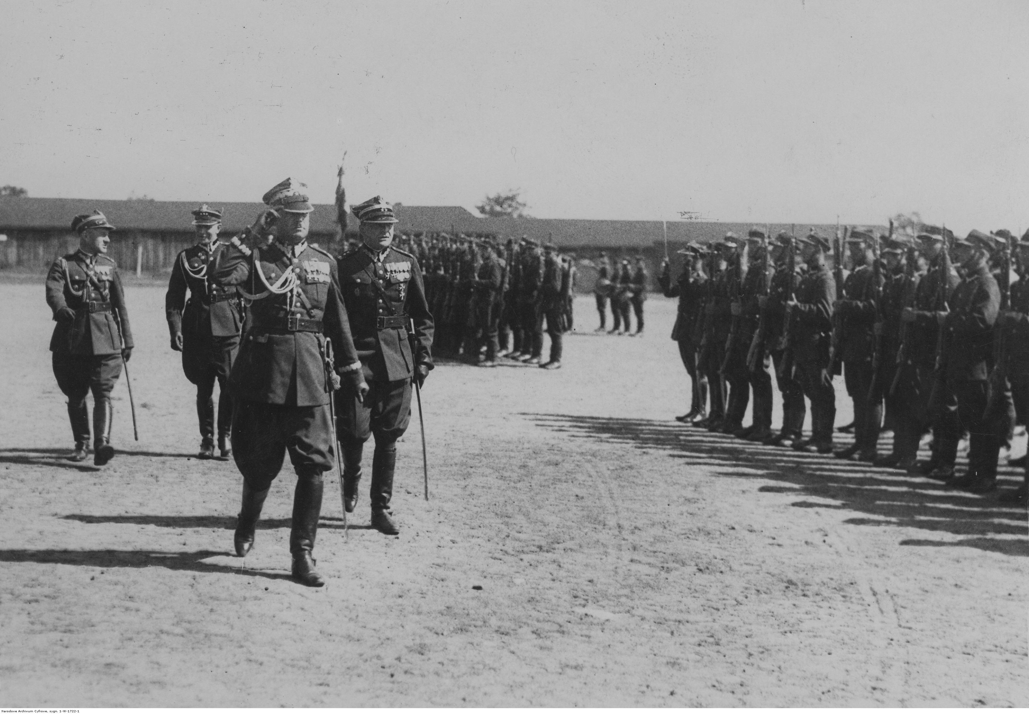 Święto 7 Batalionu Saperów w Poznaniu. Gen. Oswald Frank (na pierwszym planie) w towarzystwie m.in.: płk. Konstantego Skąpskiego i mjr. Tobika przechodzi przed frontem oddziałów. Koncern Ilustrowany Kurier Codzienny - Archiwum Ilustracji. Sygnatura: 1-W-1722-1